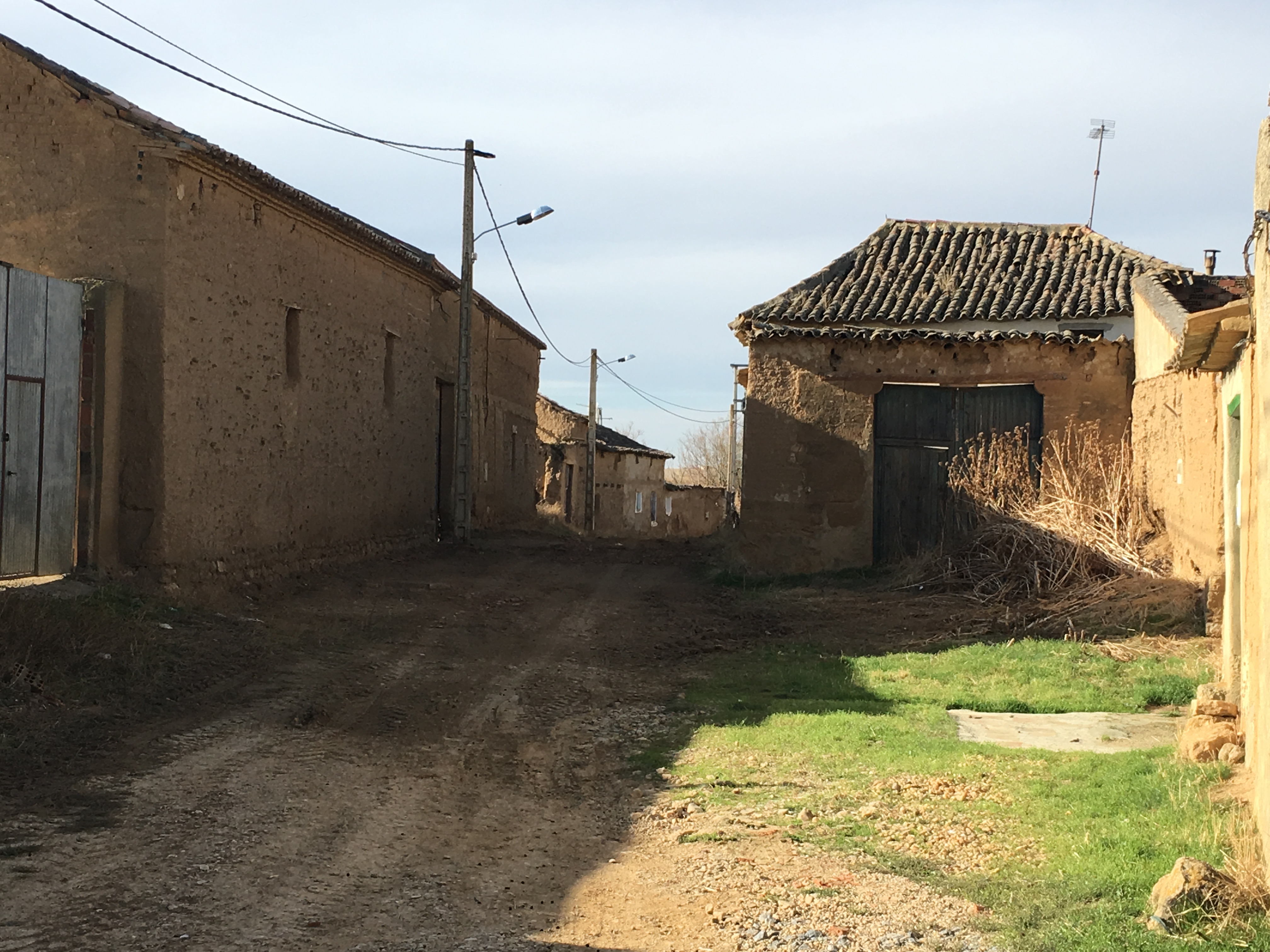 Villaesper Milenario